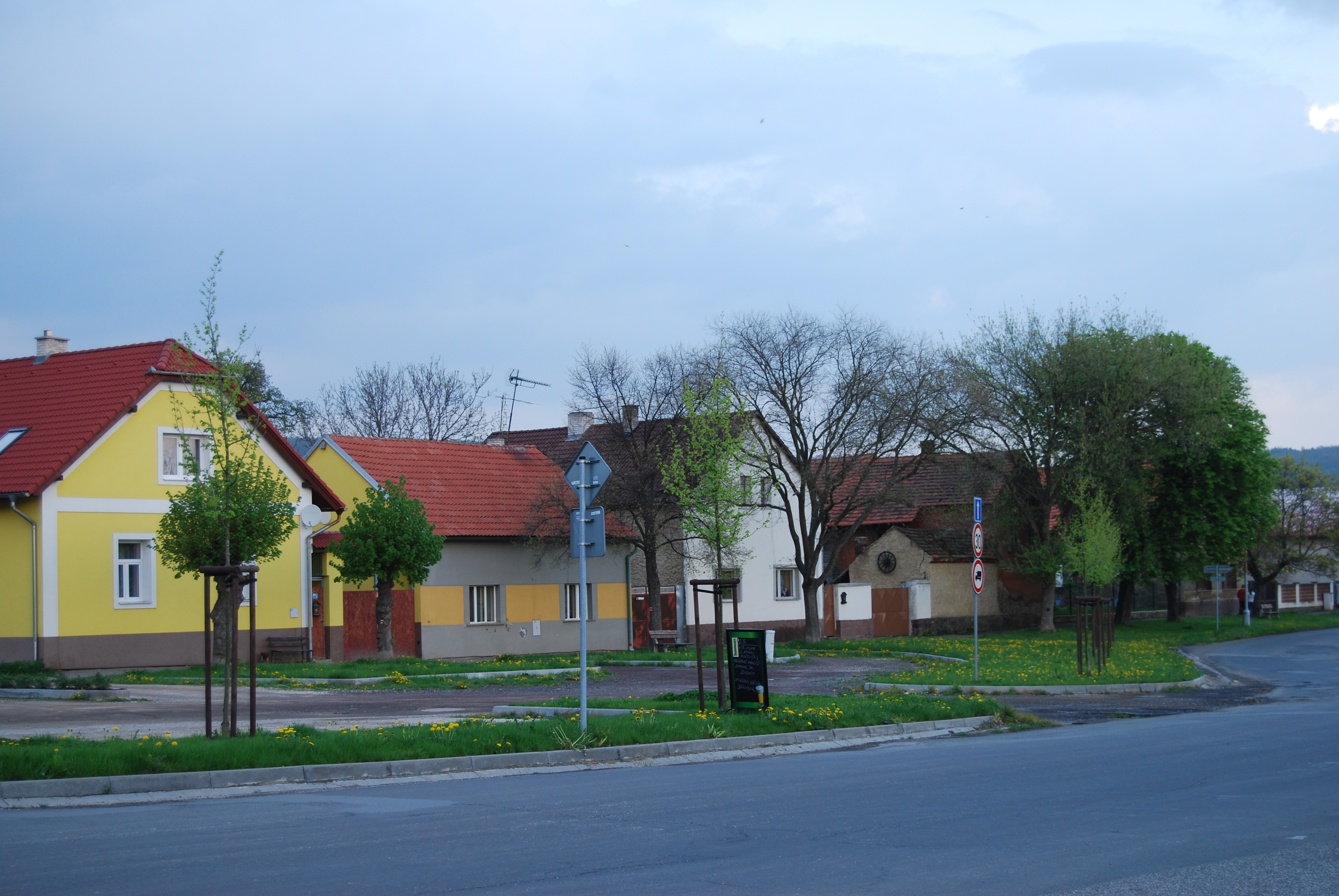 Pohled na část obce. Obec Neumětely v okrese Beroun, kraj Středočeský. Česká republika. - Google Maps - Google Earth